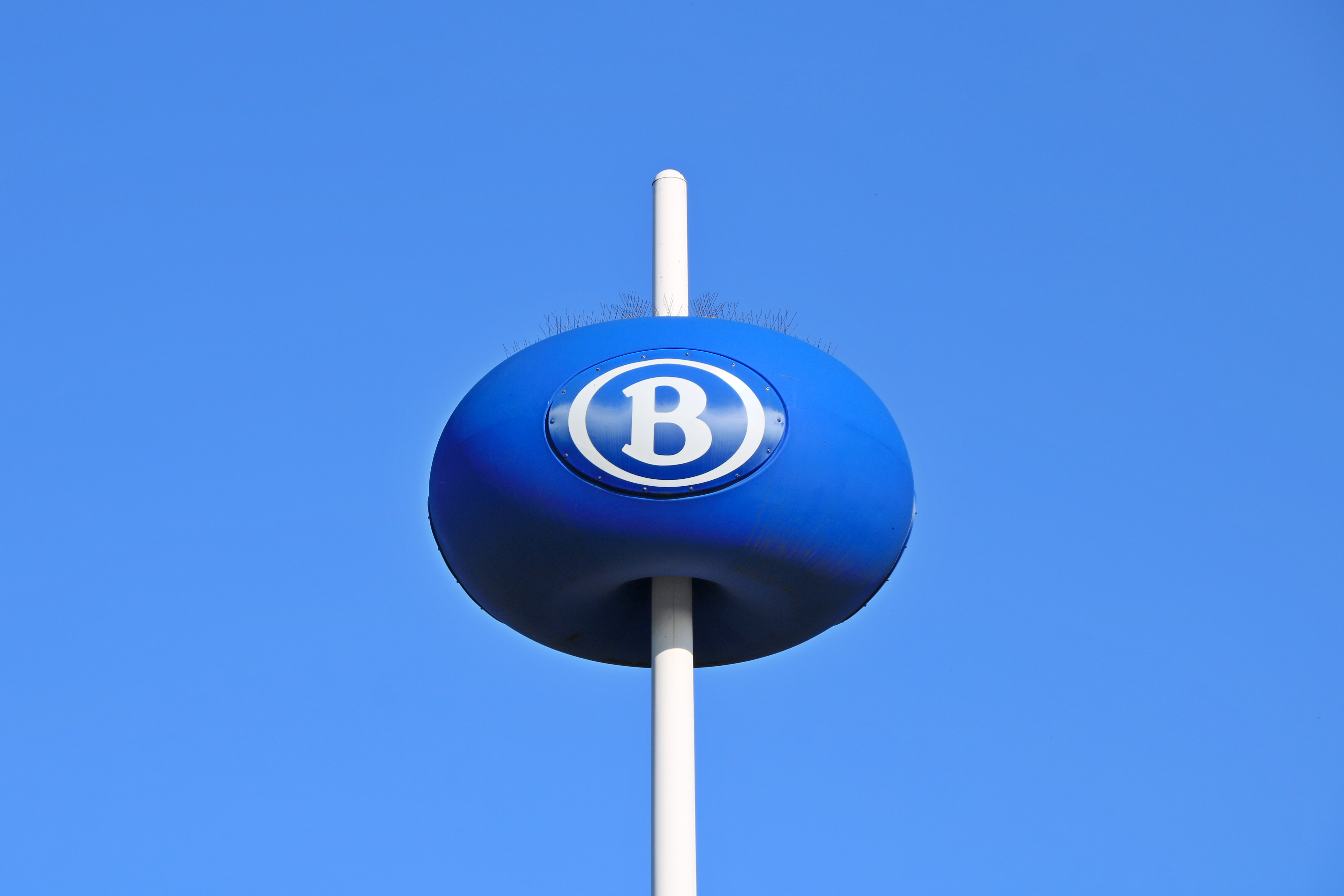 Belgique - Brabant wallon - Gare d'Ottignies - Mât